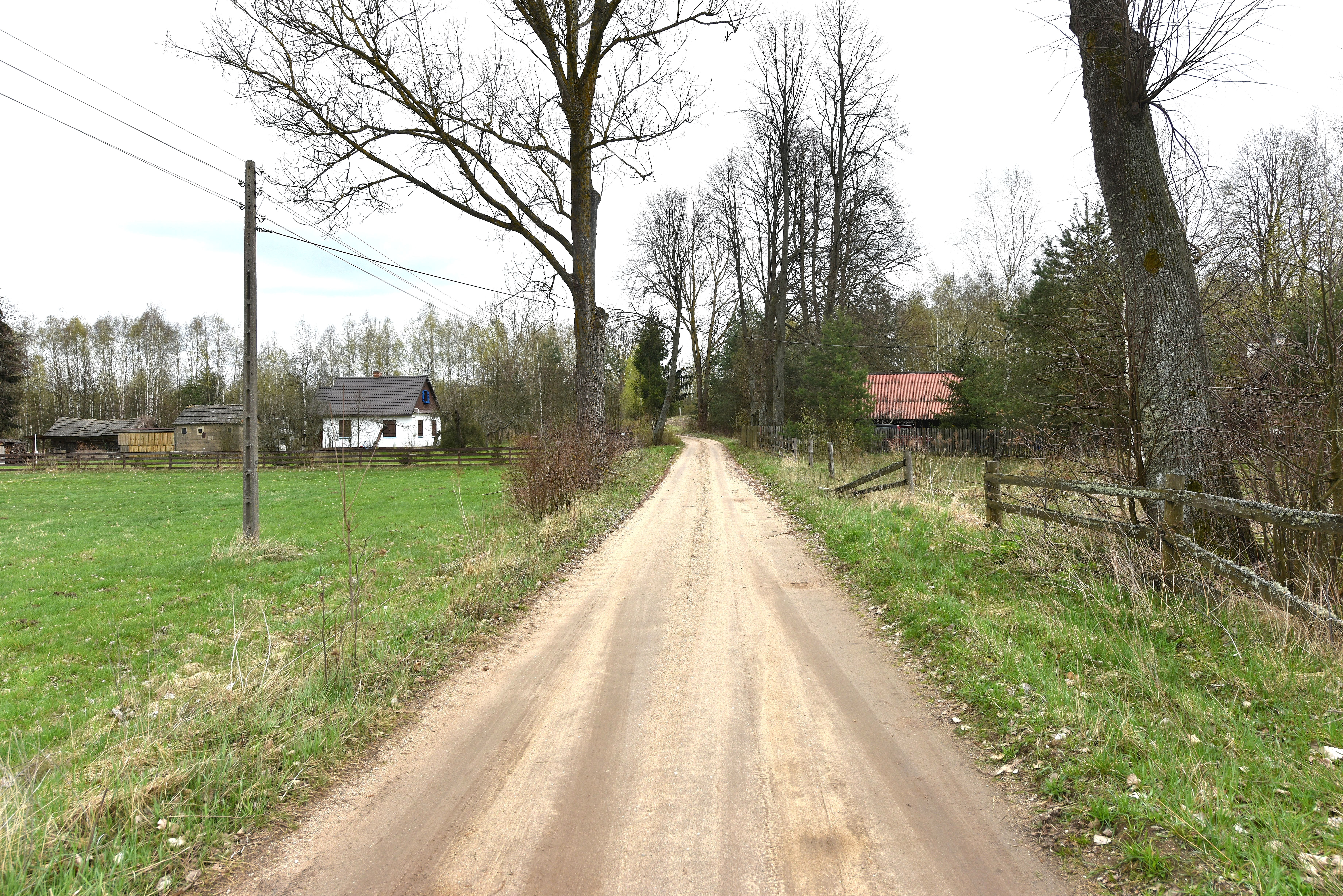 Wieś Gonczary w województwie podlaskim